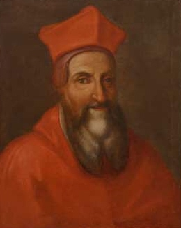 Kardinal Giovanni Morone, Porträt im Senatssaal der Universität Bologna